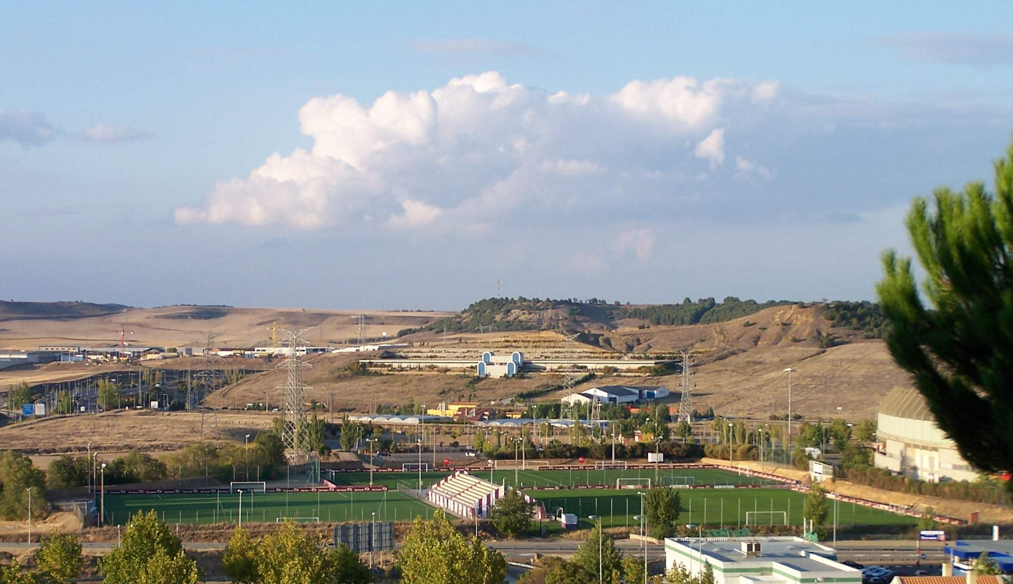 Es la foto de la ciudad deportiva del Real Valladolid, o también conocida como "campos anexos", hay tres campos de fútbol de césped artificial, y un área para porteros, entre medias hay una grada, y debajo de ella, vestuarios, y un restaurante. Foto bajo licencia creative commons, la puedes copiar, modificar y distribuir, siempre que indiques el origen y reconozcas la licencia de la foto. La foto la hice yo con mi cámara de fotos digital.